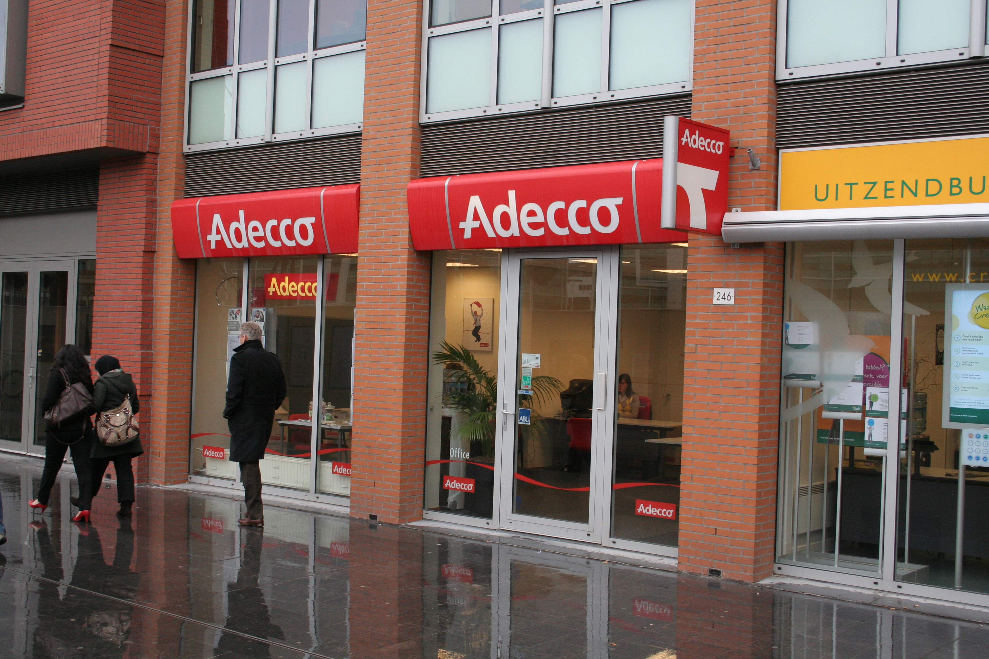 Adecco